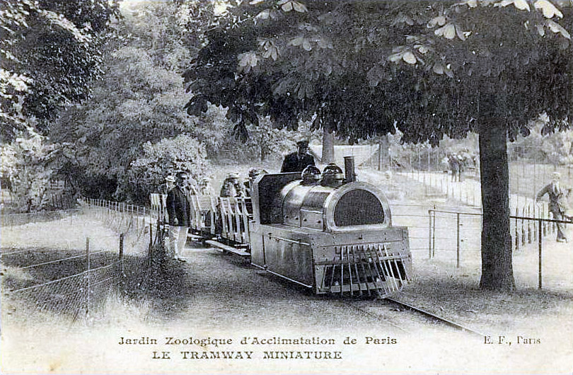 Jardin zoologique d'Acclimatation de Paris - Le tramway miniature (France).